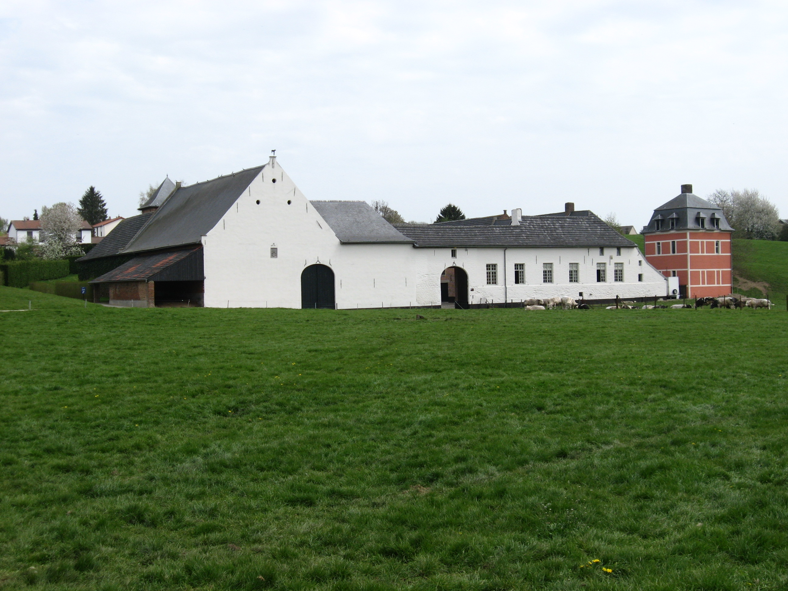 Oudevoorde hoeve in Vossem